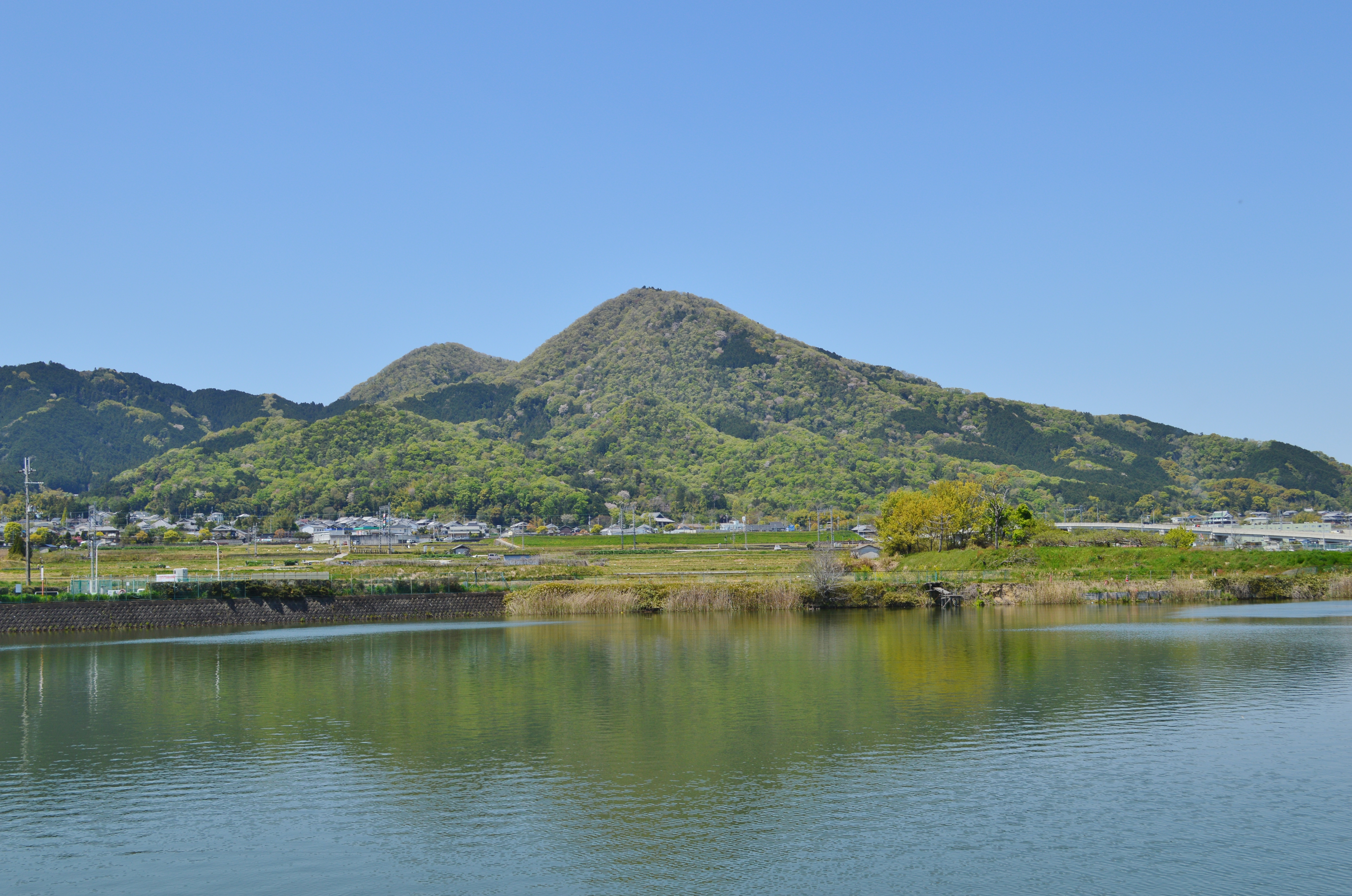 二上山 (奈良県・大阪府) 全景